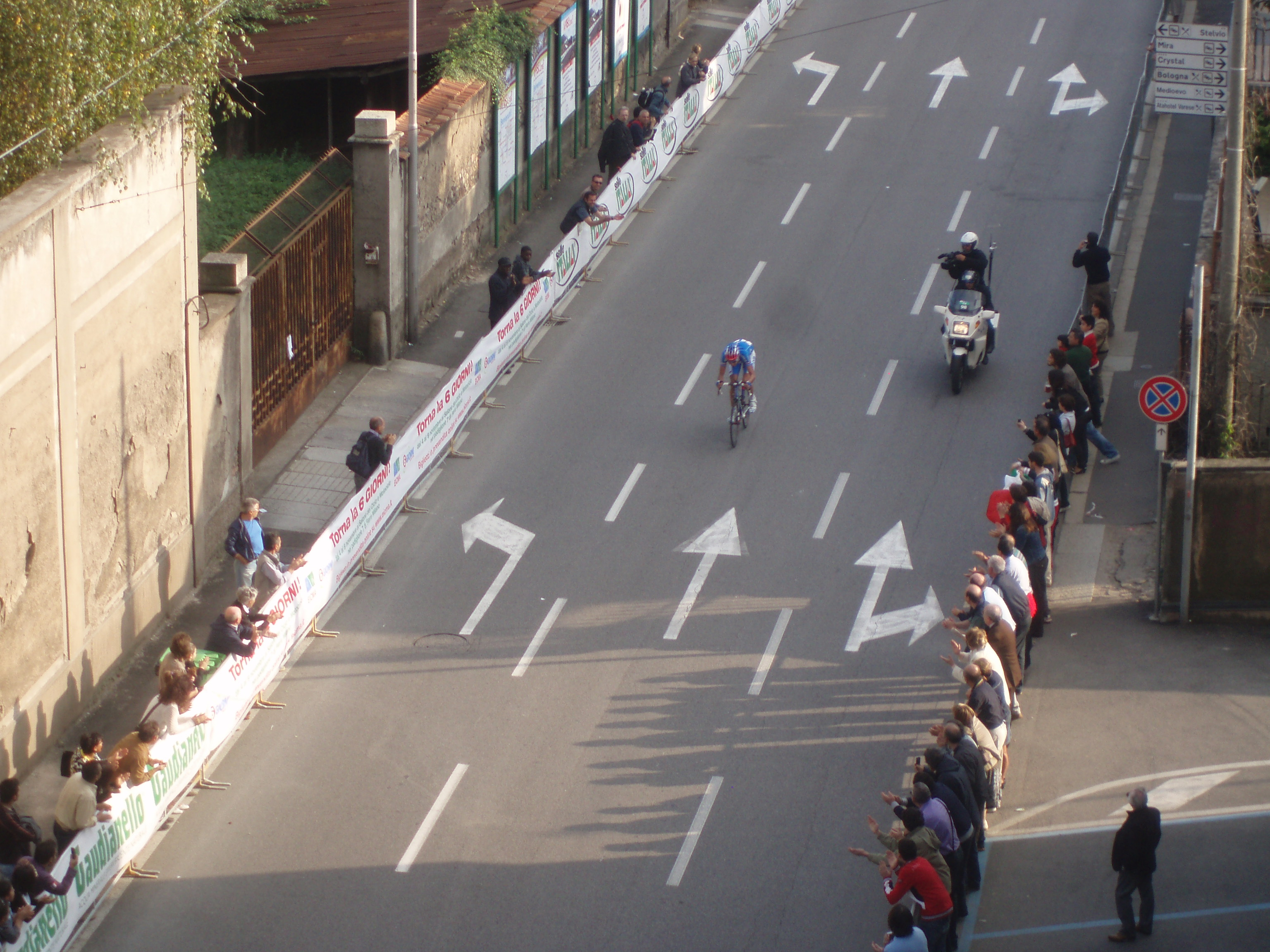 Foto presa da Antonio Giovanni Colombo durante i campionati mondiali di ciclismo 2008, a Varese, in via Carcano. Alessandro Ballan sta correndo verso la vittoria ai Campionati Mondiali di ciclismo su strada 2008, incitato dagli incoraggiamenti della gente che assiste alla gara.